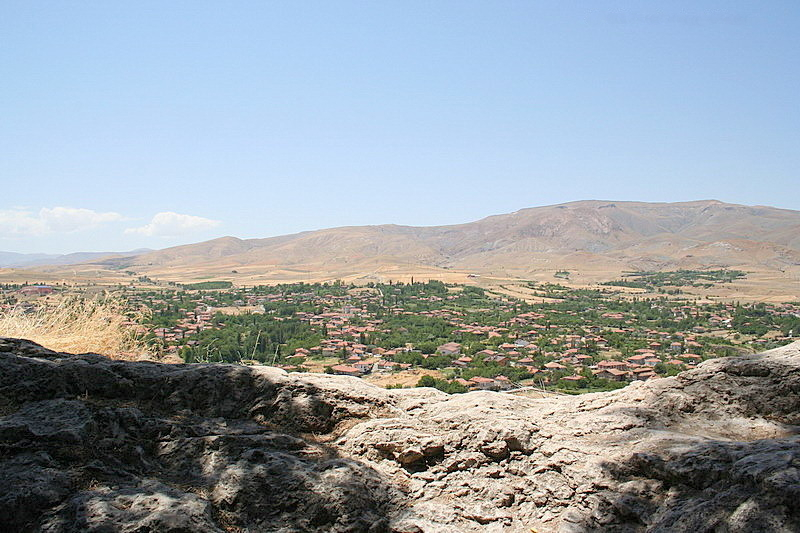 Divriği,Sivas, Turkey .Genel Görünüm